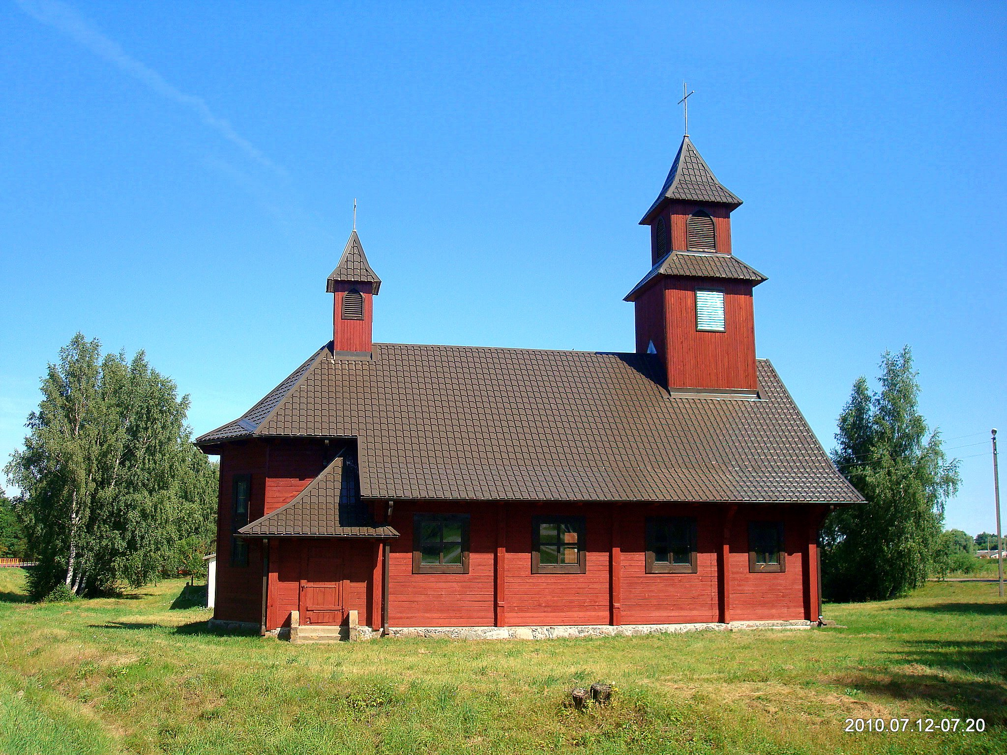 Костёл Сердца Иисуса